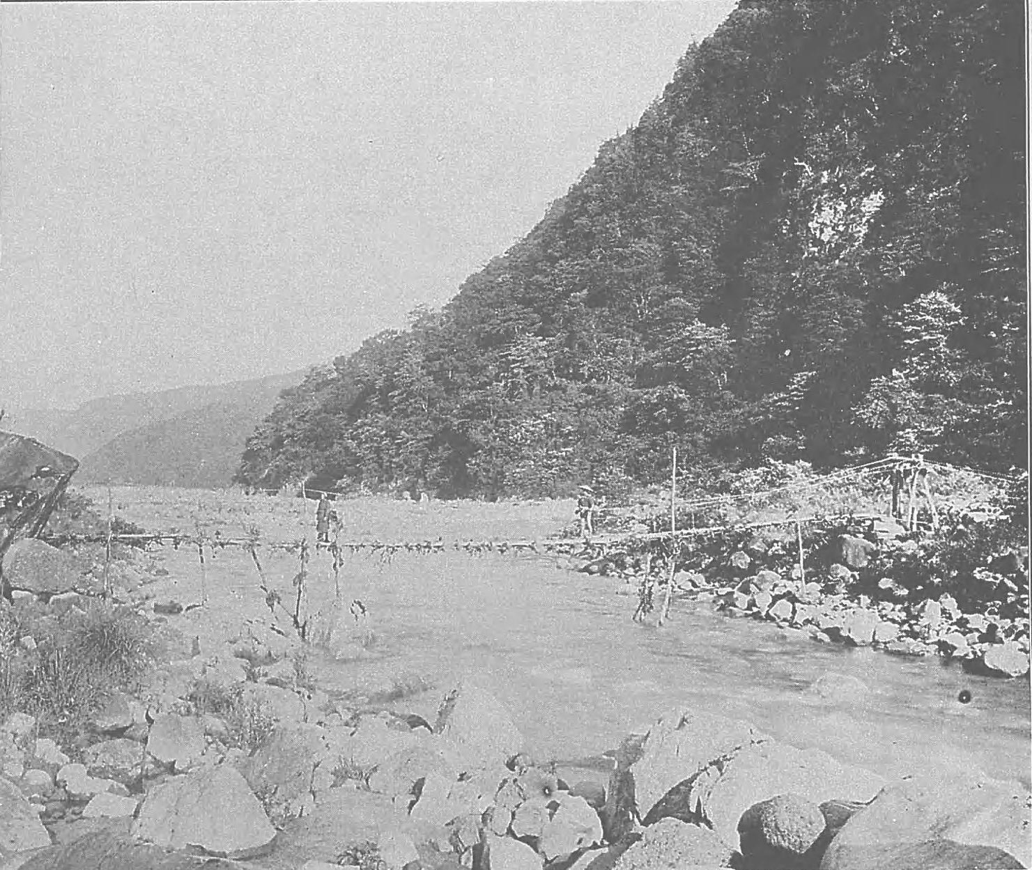 説明文に「称名川の常願寺川本流に合する処危巌峭立奔湍白雪を飛ばして夏尚ほ寒し一奇橋あり藤蘿を両岸の巨岩に繋ぎ之を架す歩歩揺蕩始めて渡る人は心胆を寒からしむ名けて藤橋といふ」とあり